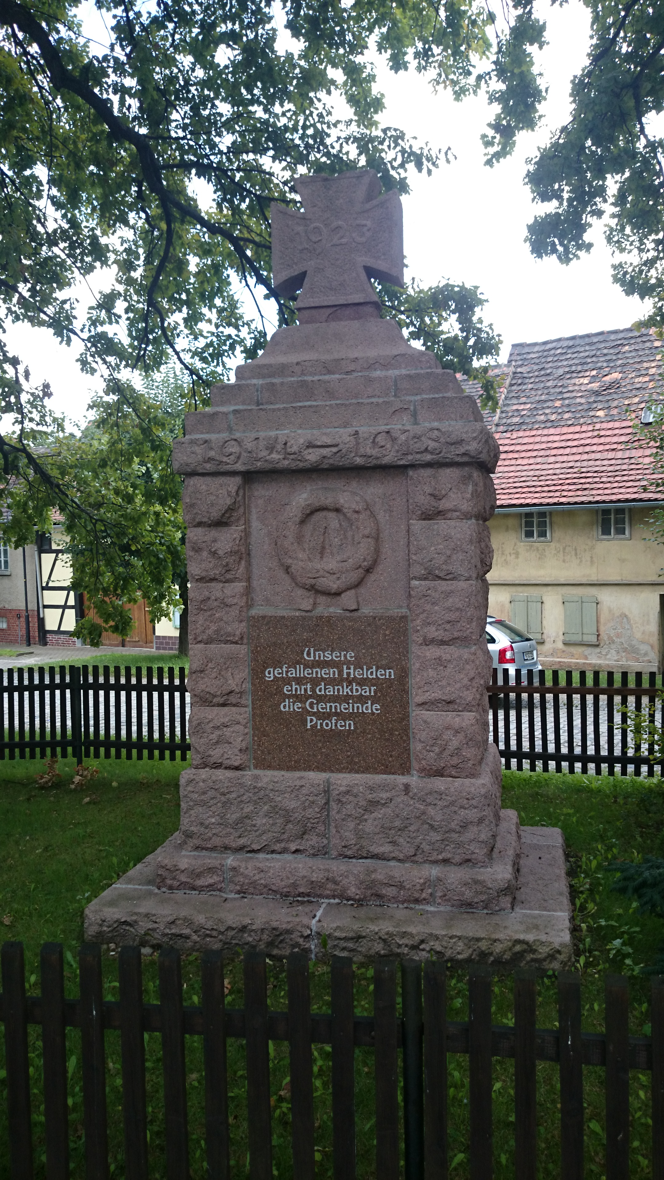 Gefallenendenkmal 1. Weltkrieg in Profen